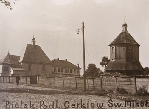 Сожённая в июне 1941 г. православная церковь (территория Беларуси, ныне - Польши).